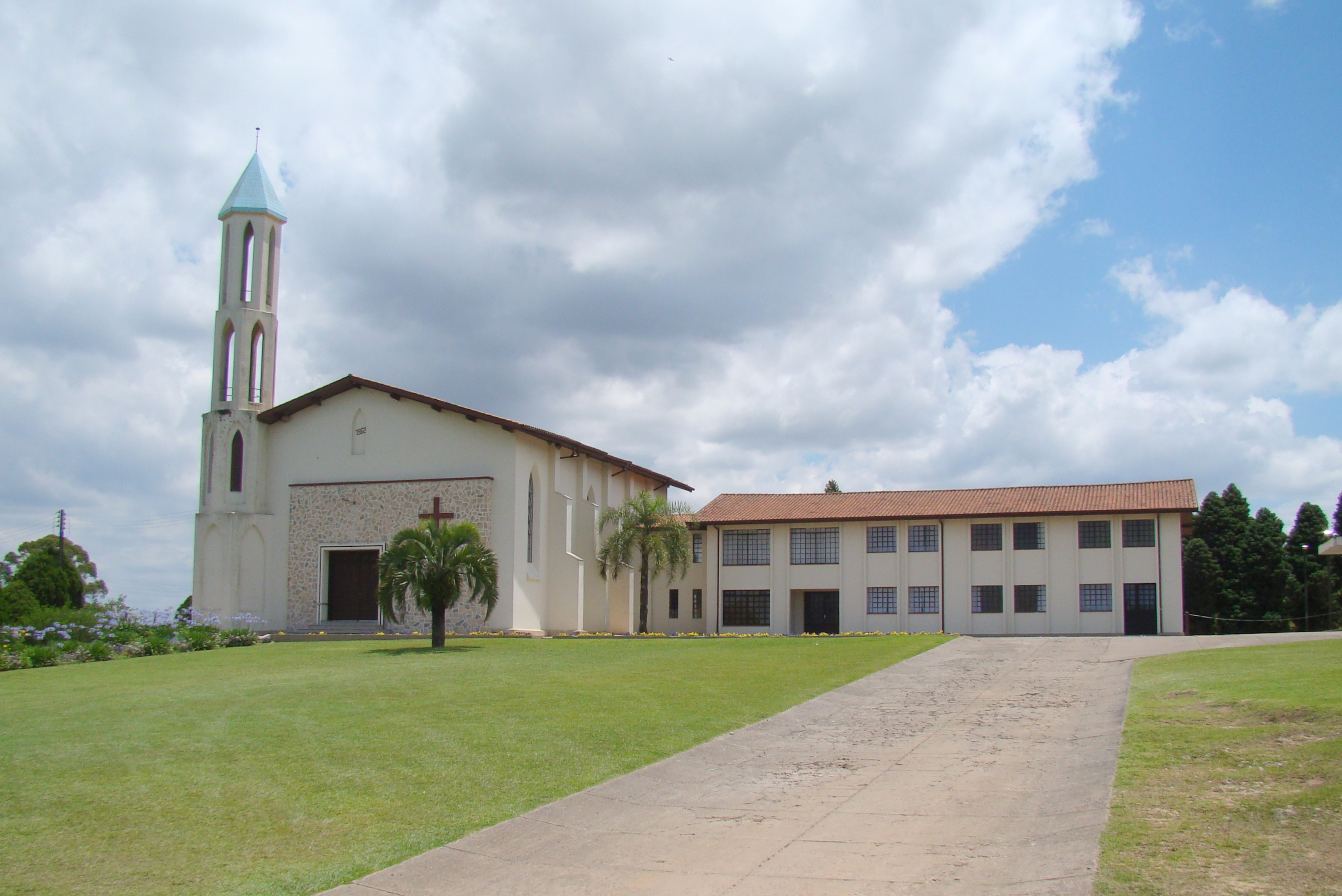 Igreja Menonita na Colônia Witmarsum, Paraná, Sul do Brasil.